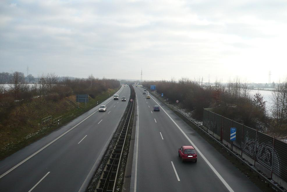 Blick auf die AS Lüneburg-Nord der BAB39 (in Fahrtrichtung Lüneburg)